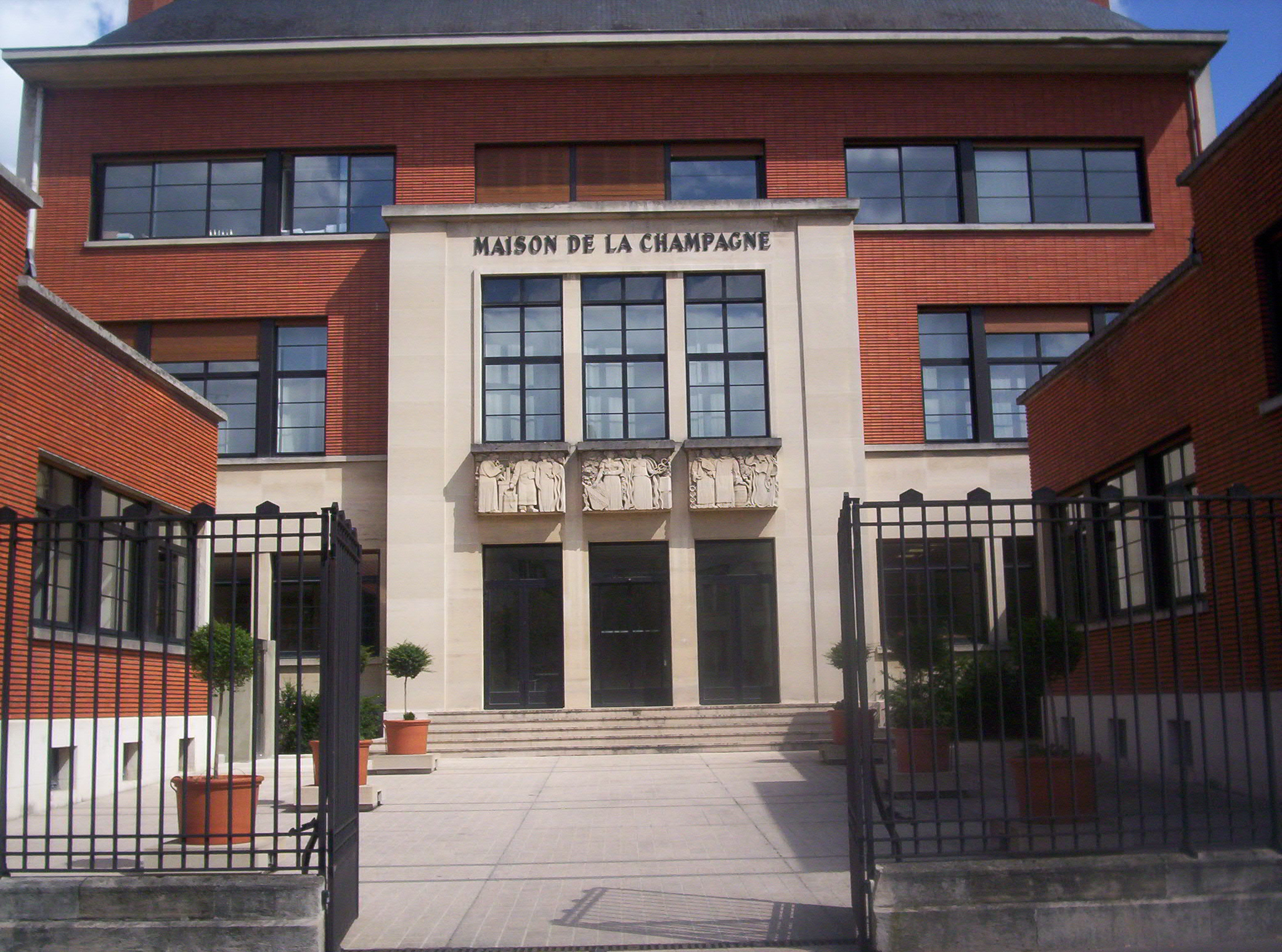 Maison de la Champagne - Rue Henri Martin - Épernay